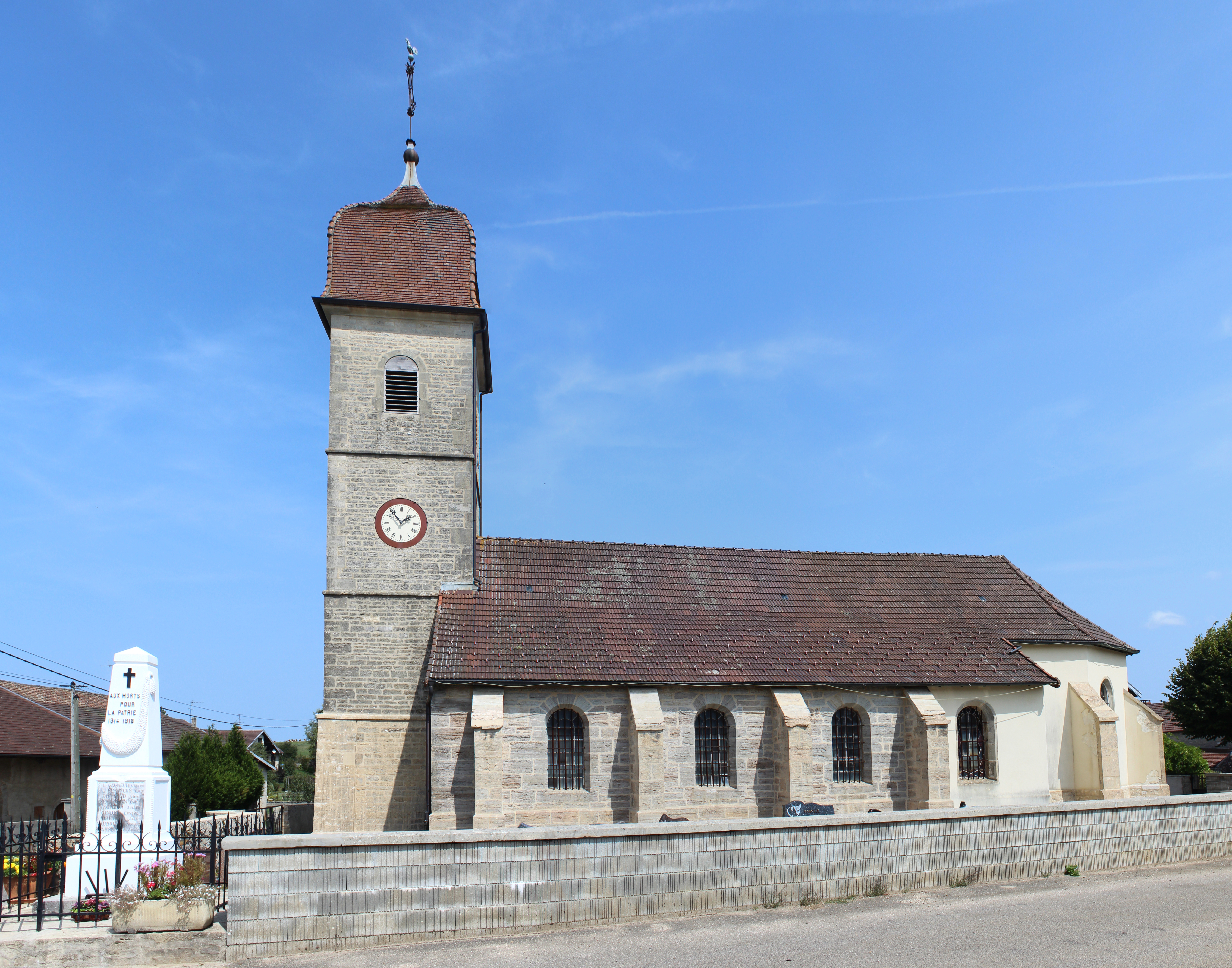 Église Saint-Viatre de Molain, Jura.